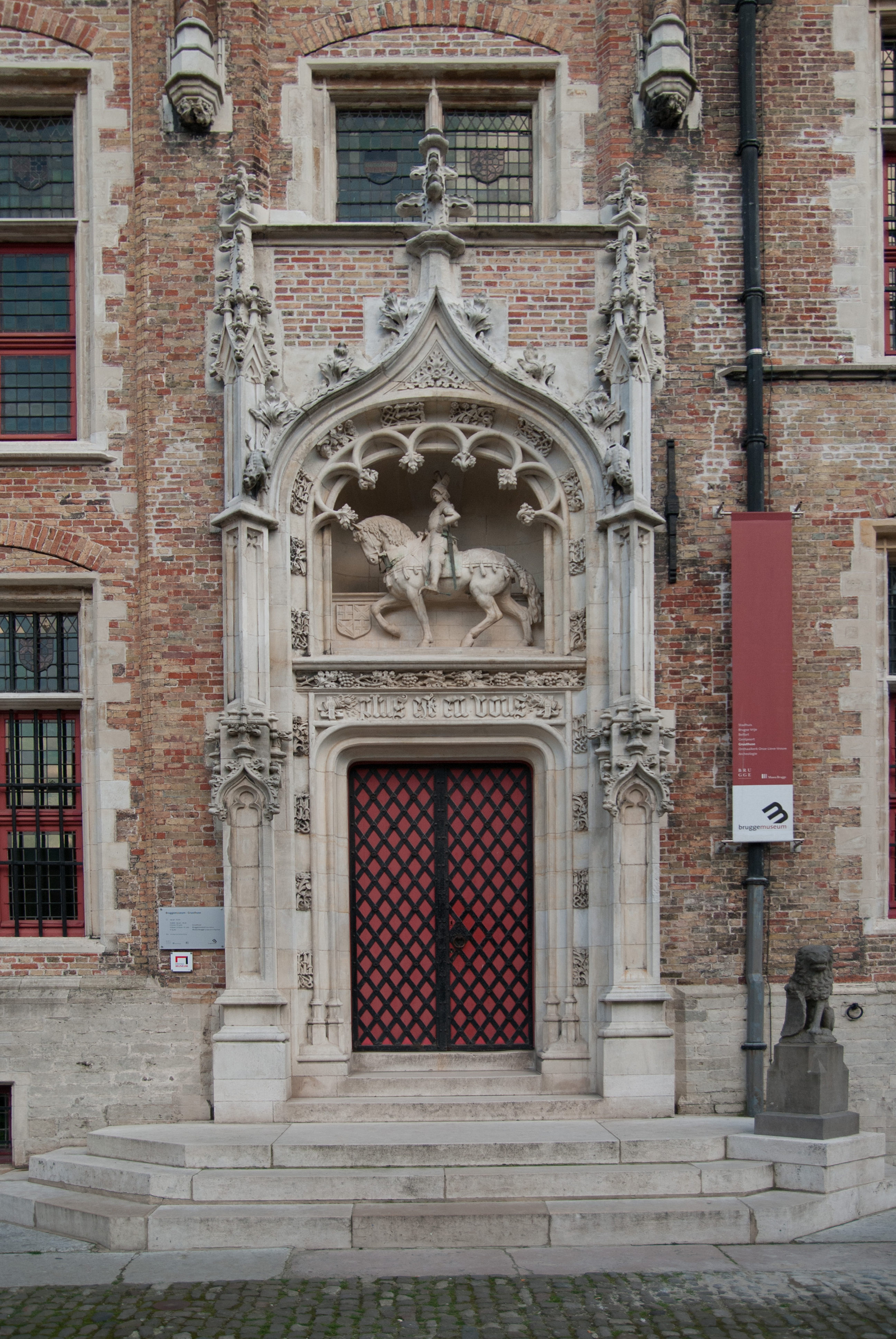 Entree van het Huis van de Heren van Gruuthuse, Brugge, met de wapenspreuk plus est en vous